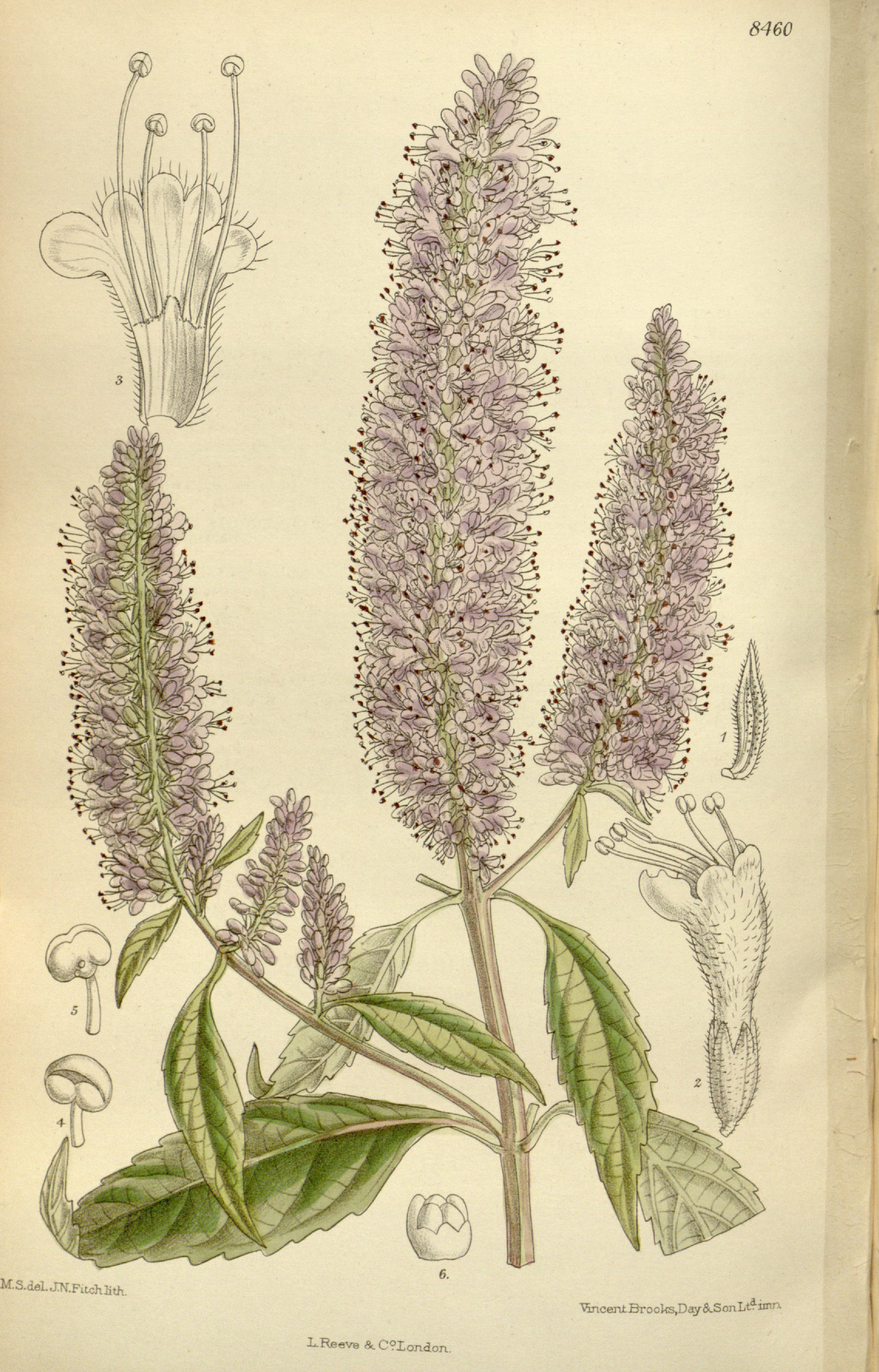 Elsholtzia stauntonii, Lamiaceae